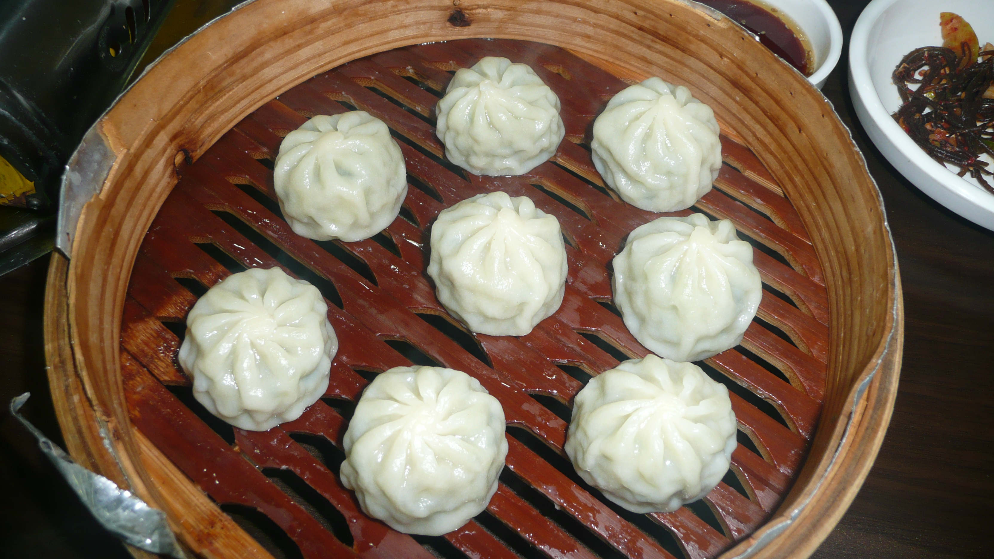 Mandu - Koreanische Teigtaschen mit Fleischfüllung, in einem Restaurant in Daejeon, Korea